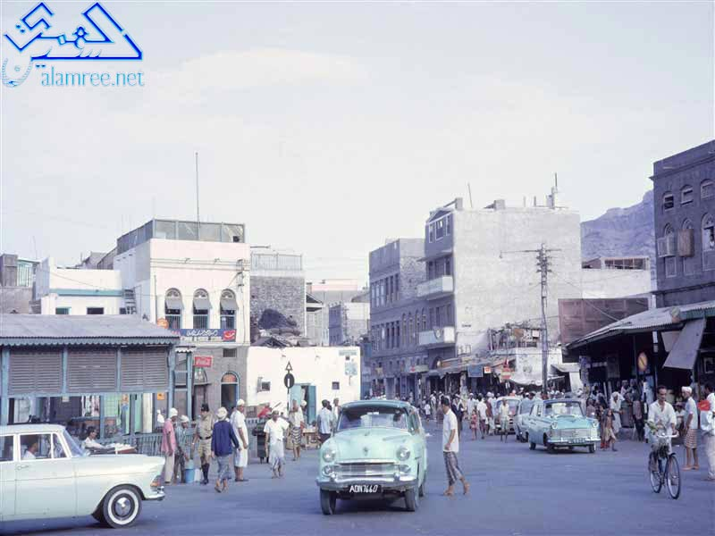 كريتر الميدان مقهى زكو عام 1962